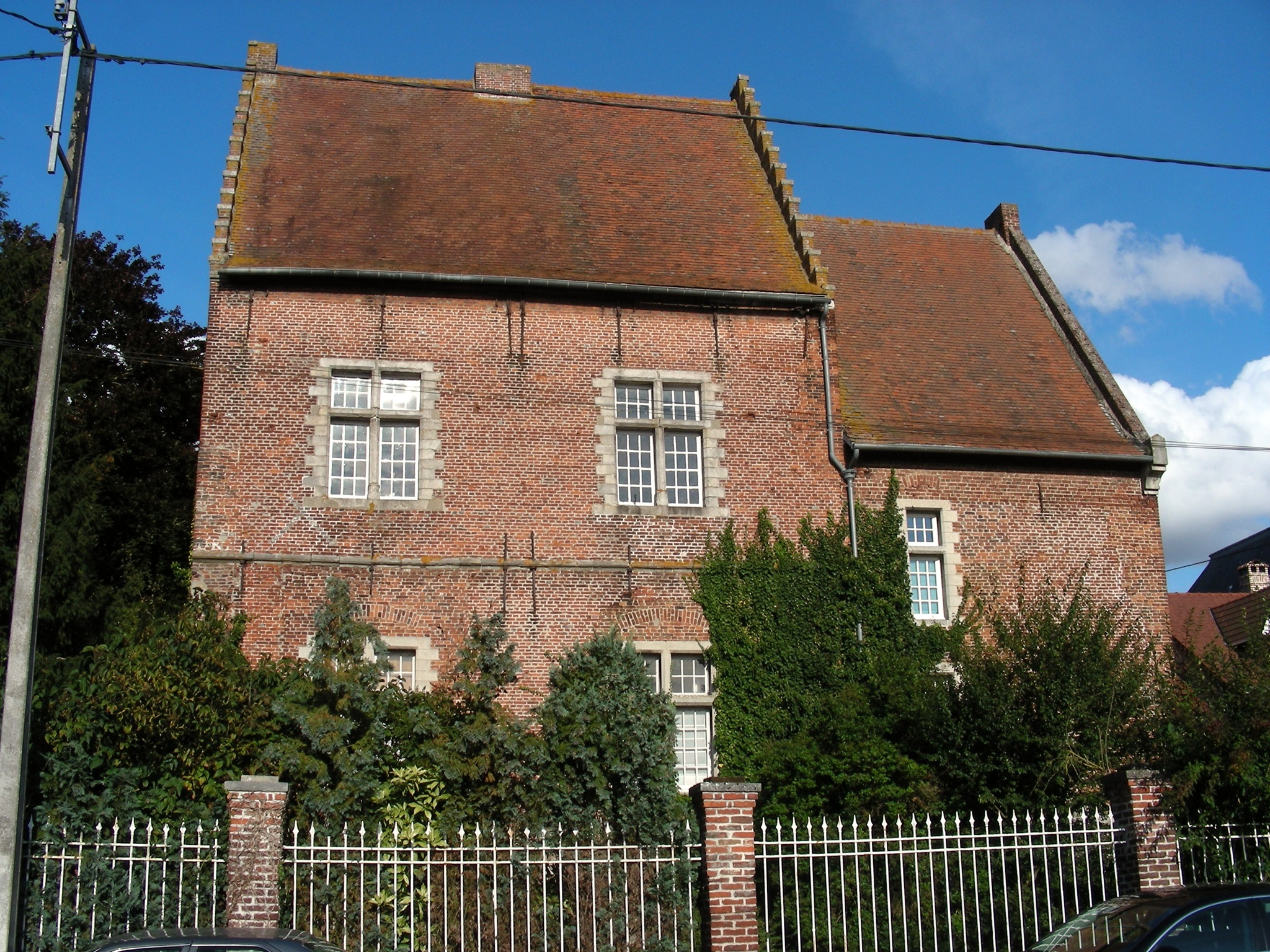 Façade .